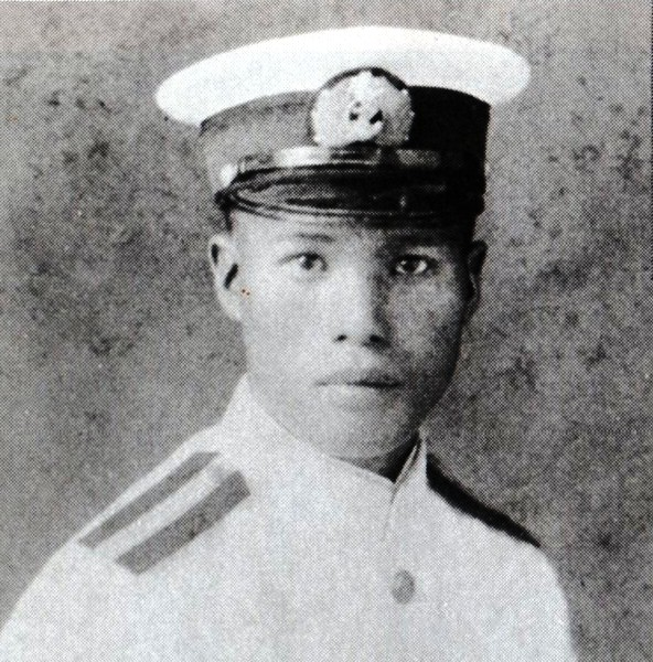 Toibana Kurio is an Imperial Japanese Navy Captain